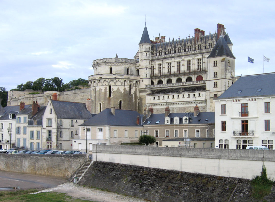 Château Aubry d'Amboise, Indre-et-Loire, France